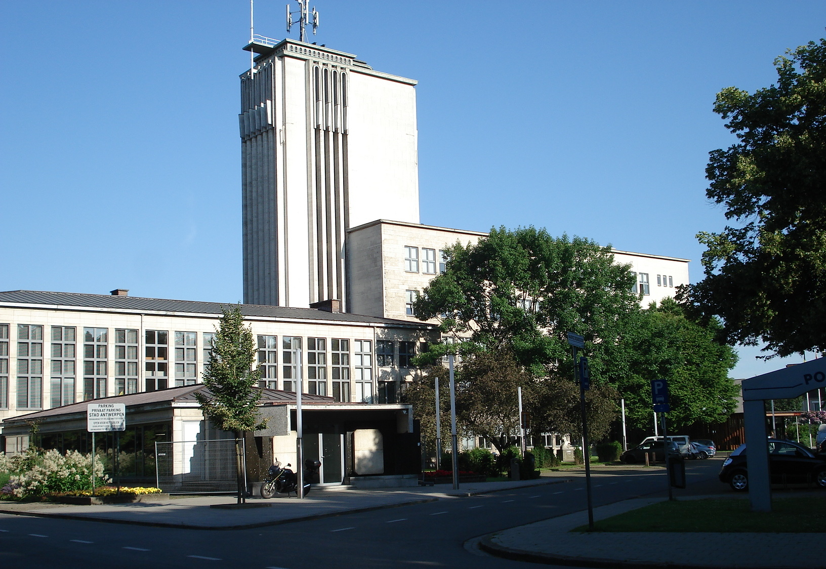 Deurne-Antwerpen. Districtshuis. N.o.v. arch. Eduard van Steenbergen (senior, 1889-1952), uitvoering door arch. Edward van Steenbergen (junior, 1925-2003).